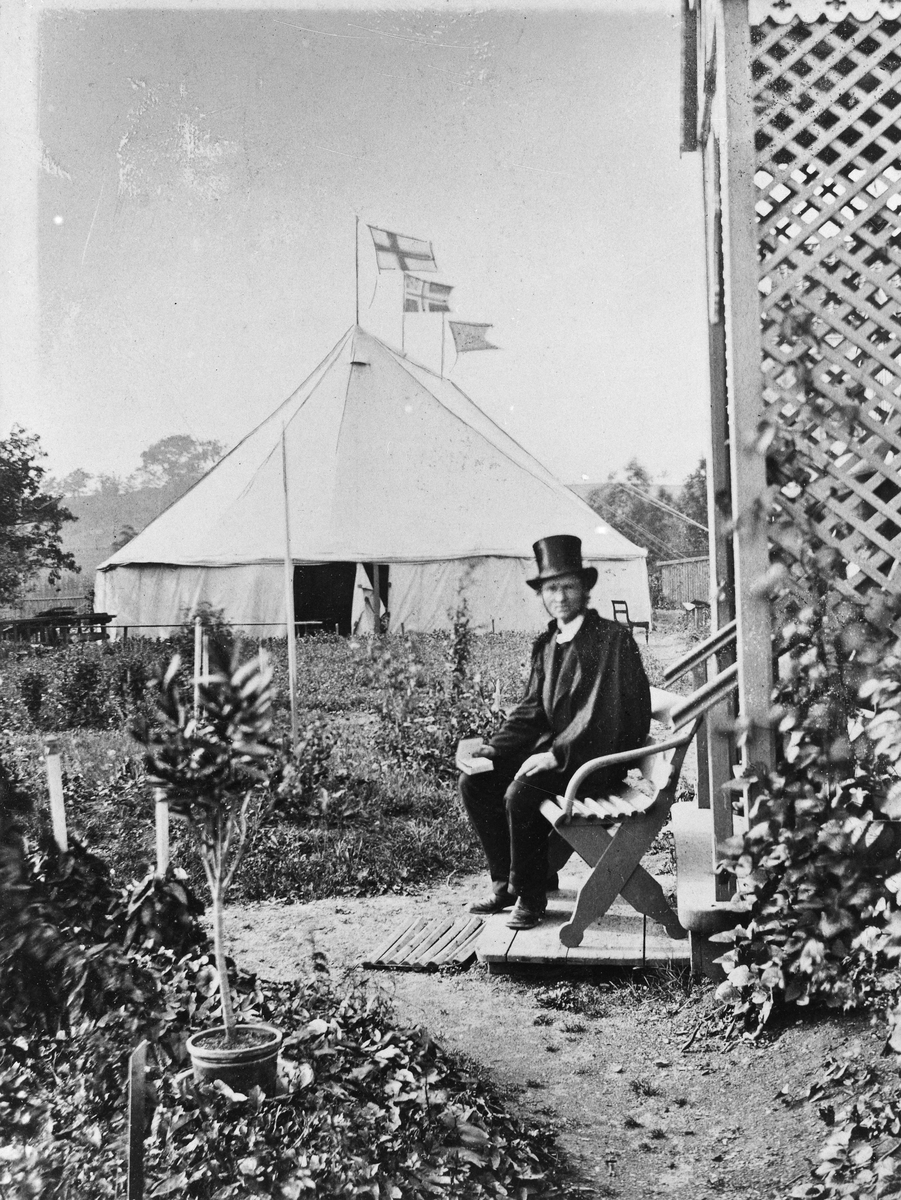 Pastor Johan Storjohann utenfor sitt misjonstelt på Sagene, hage, mann, pastor, benk, misjonstelt.